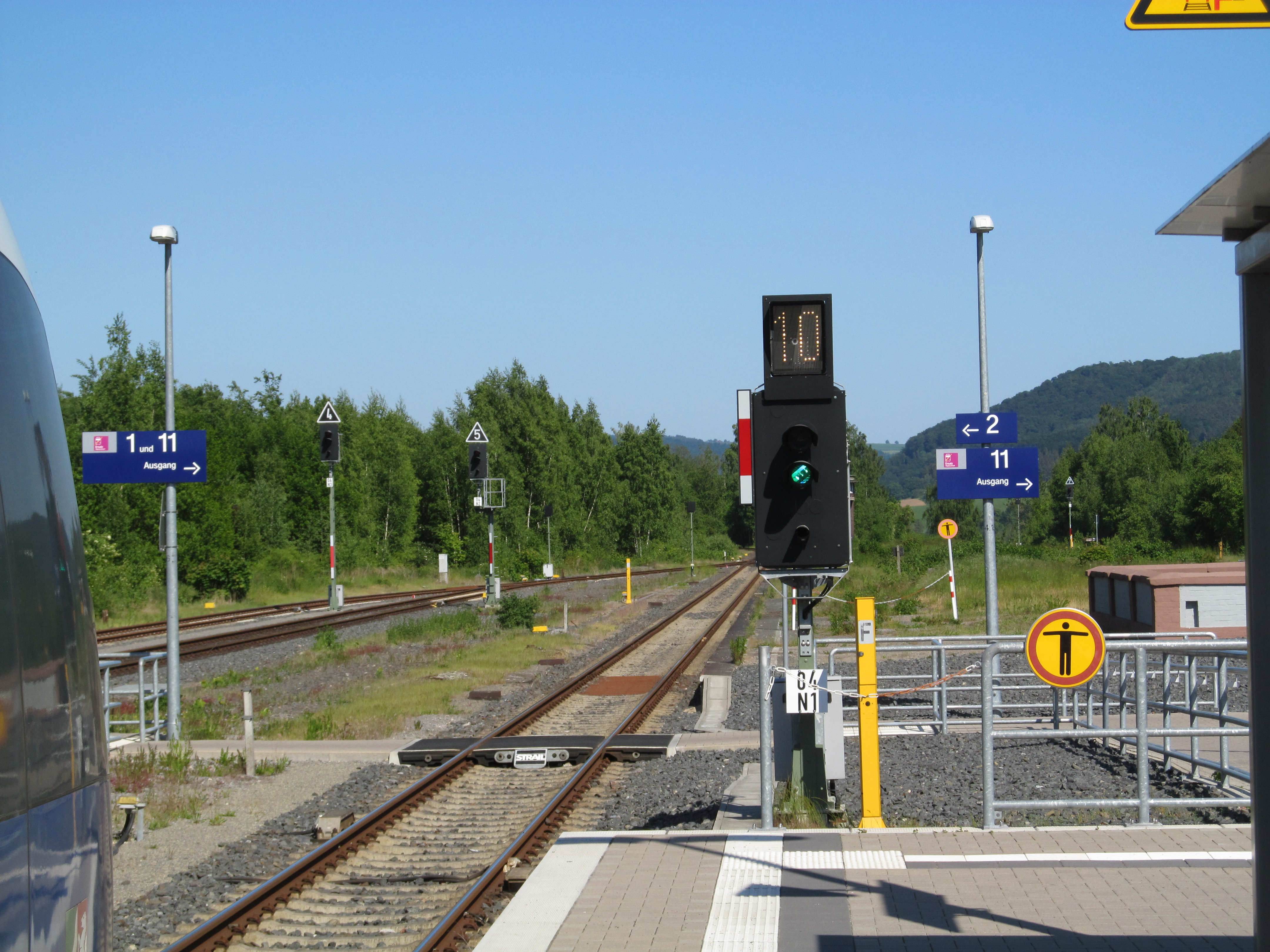 Ausfahrsignal am Bahnhof Ottbergen, Gleis 1, in Richtung Holzminden